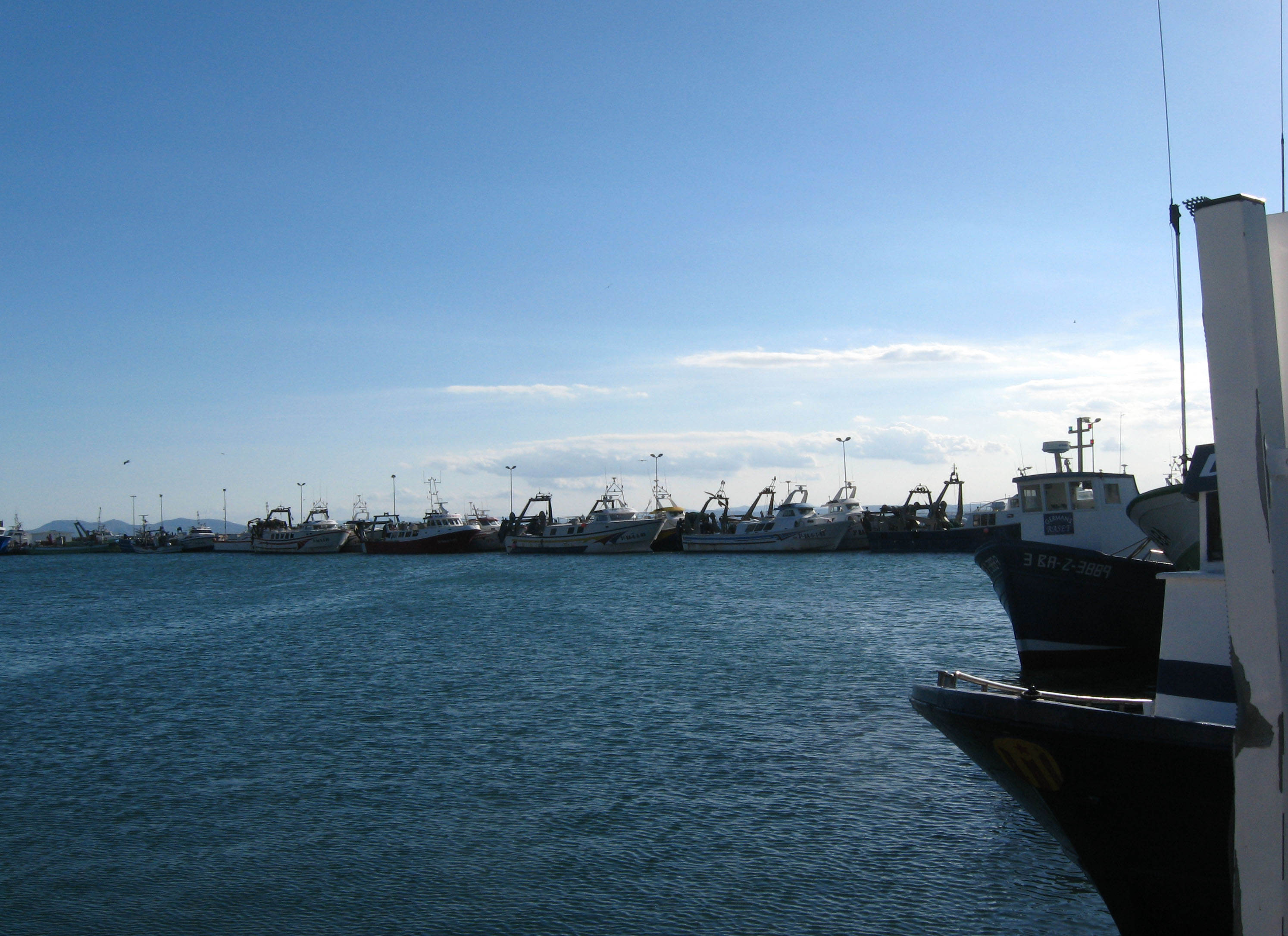 Der Fischerhafen von Roses Datum: 10.09.2010 Urheber: Michael Pfeiffer alias Benutzer:Gordito1869 Quelle: privates Fotoalbum des Urhebers